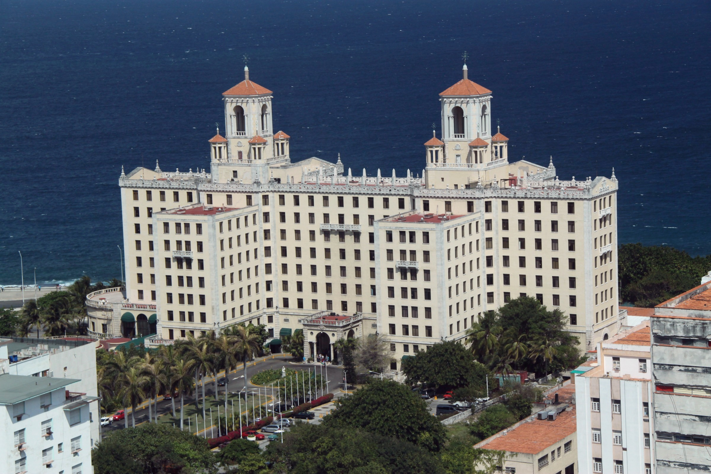 Hotel Nacional de Cuba